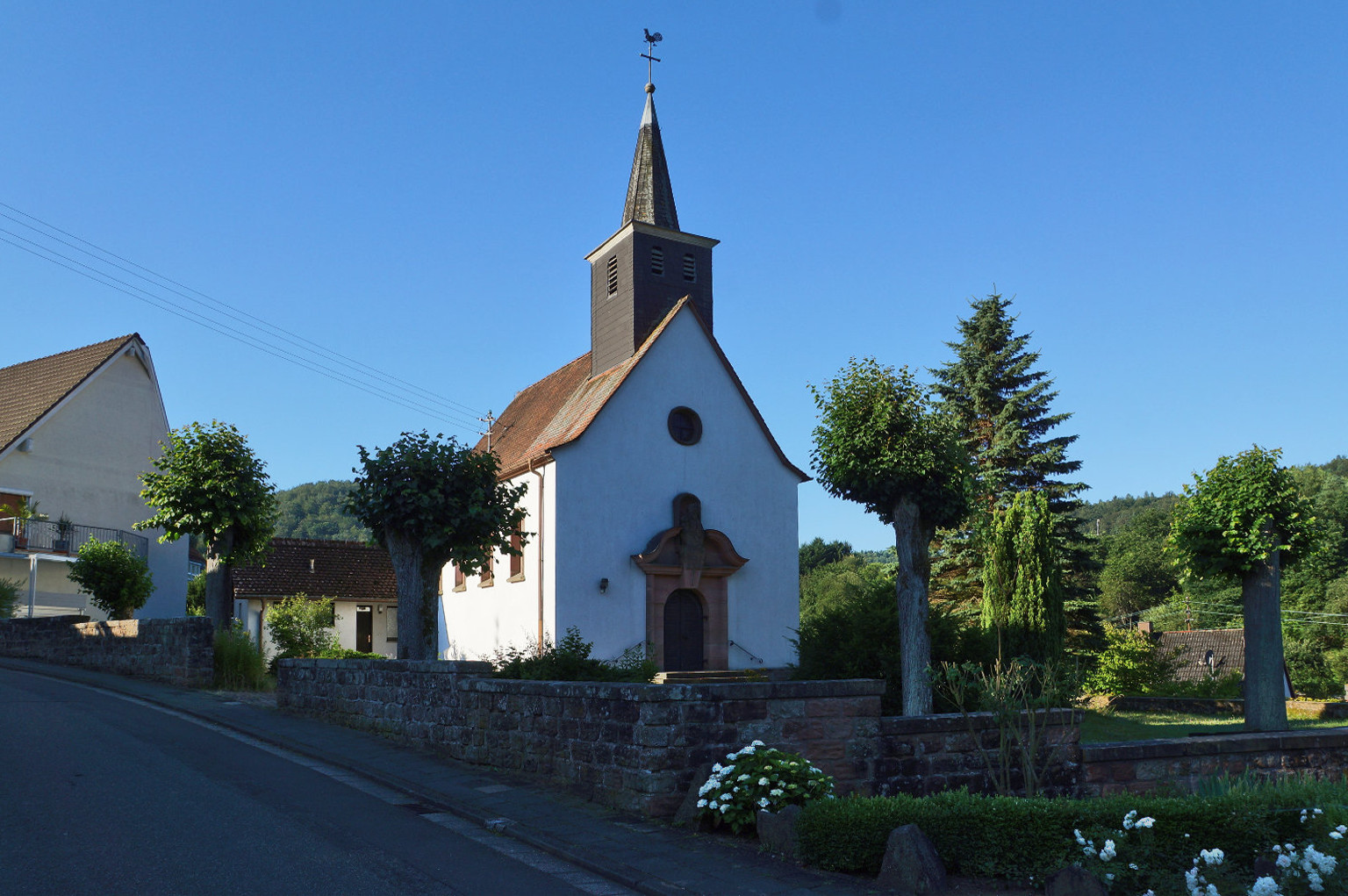 Katholische Filialkirche St. Blasius in Mölschbach bei Kaiserslautern